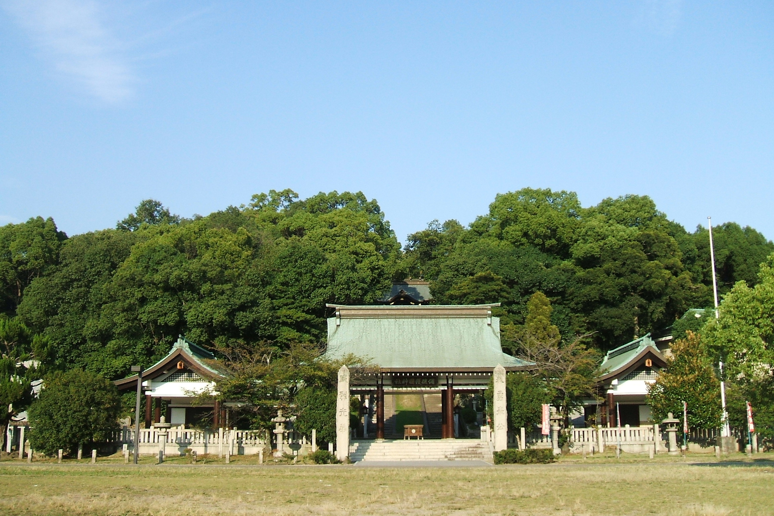 広島県福山市にある備後護国神社の神門。